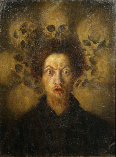 картины художника Луиджи Руссоло